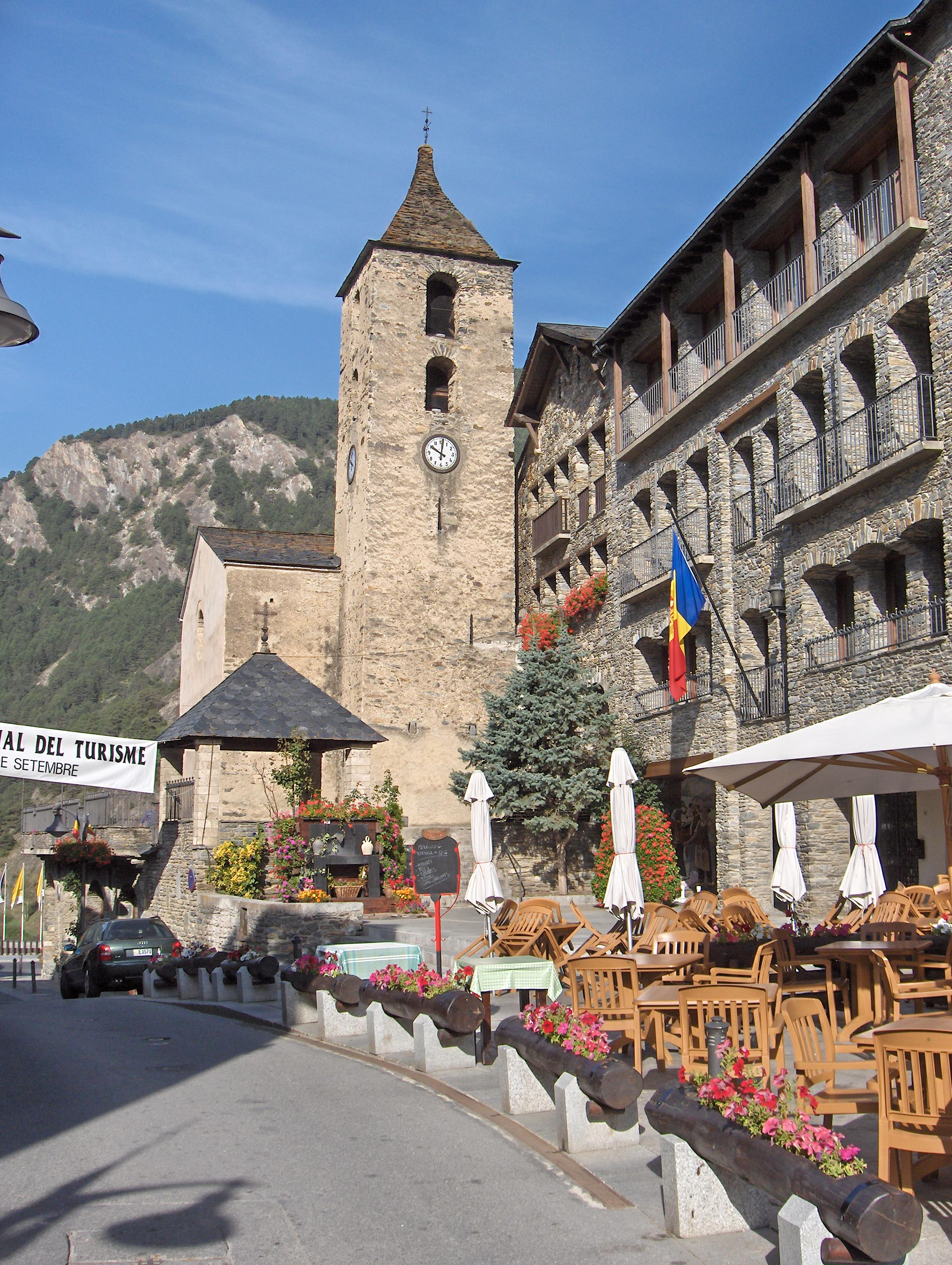 Ordino Church, Andorra